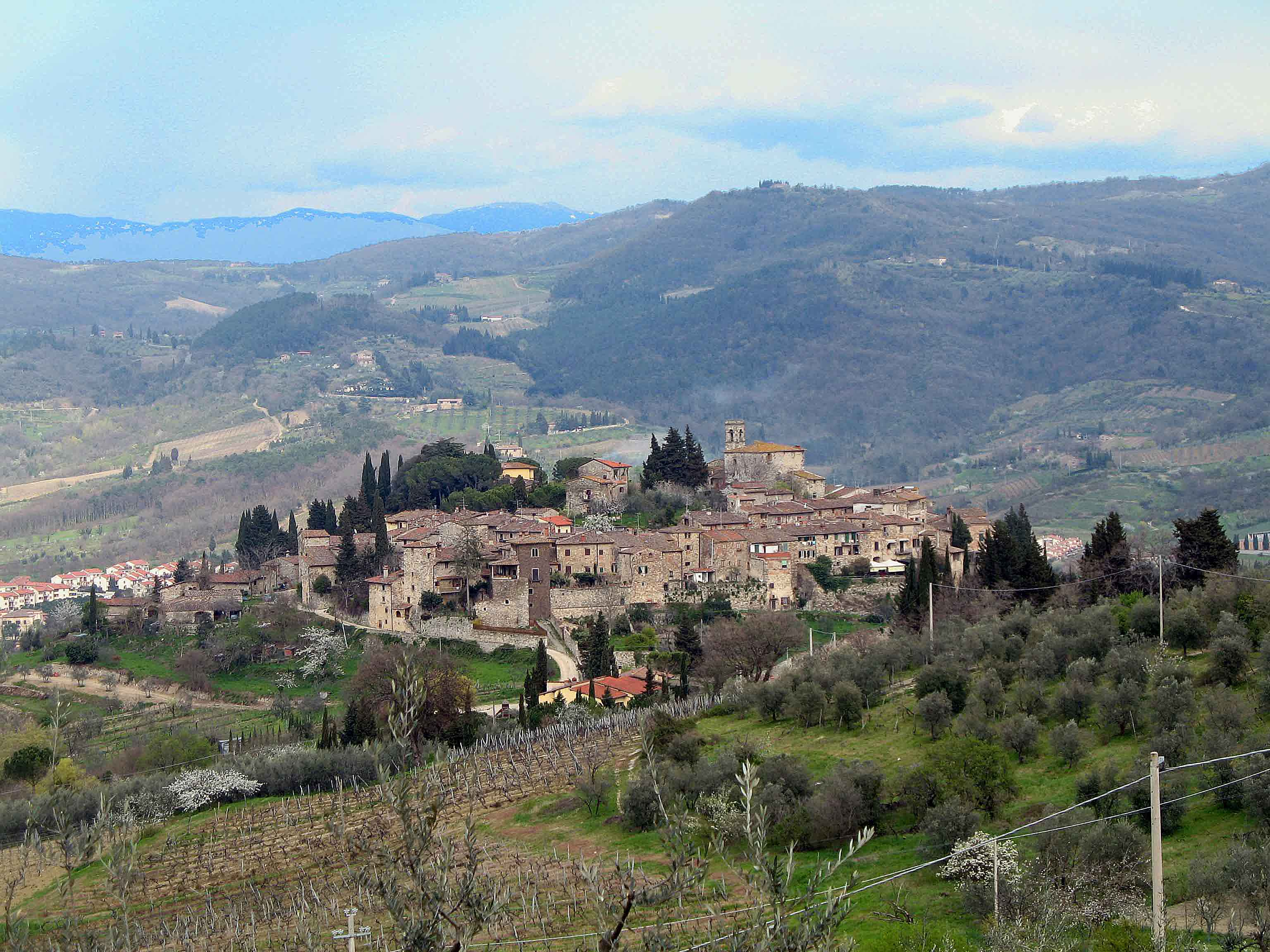 Panorama di Montefioralle (Greve in Chianti)